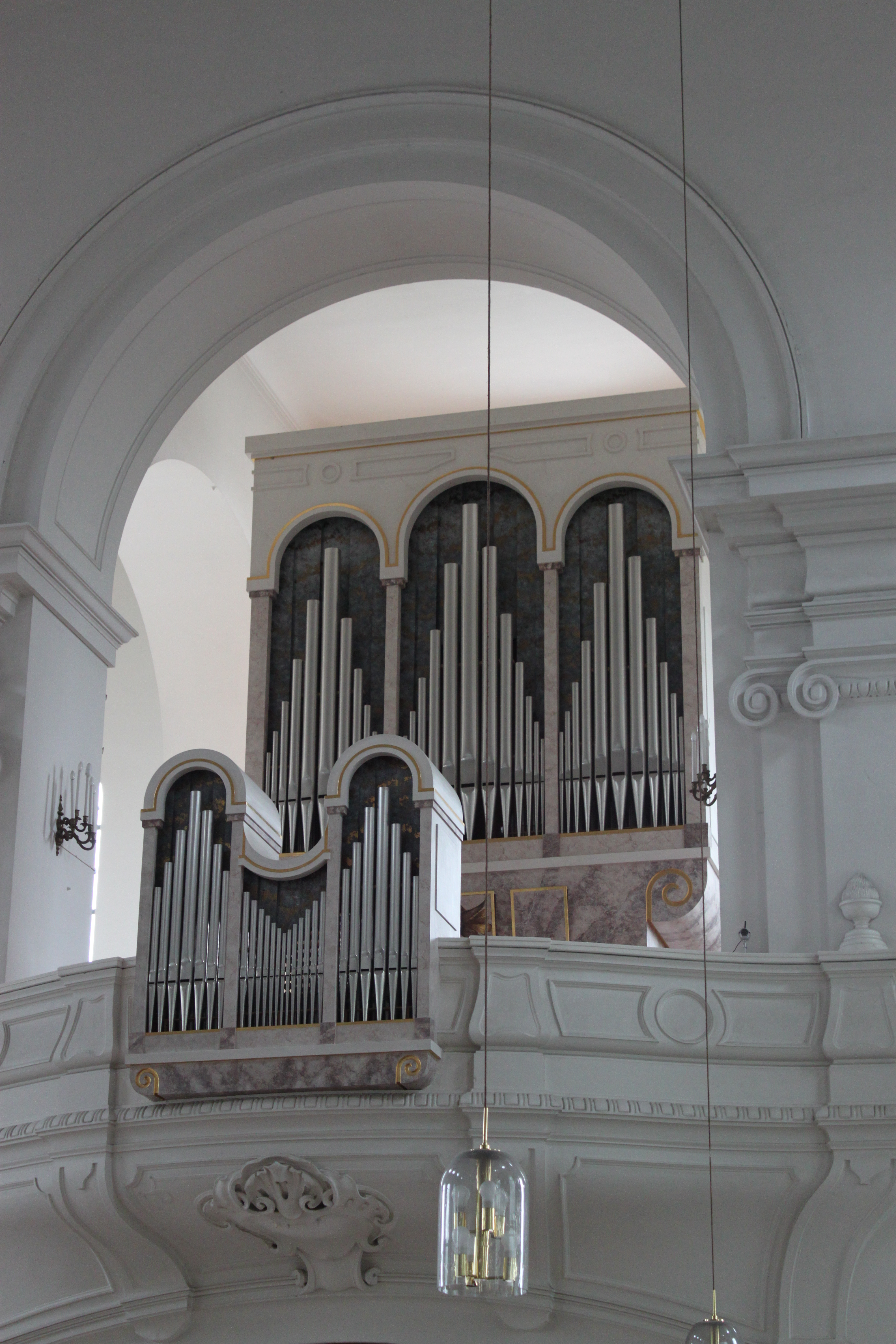 Orgel der Kaasgrabenkirche, Wien 19, errichtet 1995 von Gerhard Hradetzky